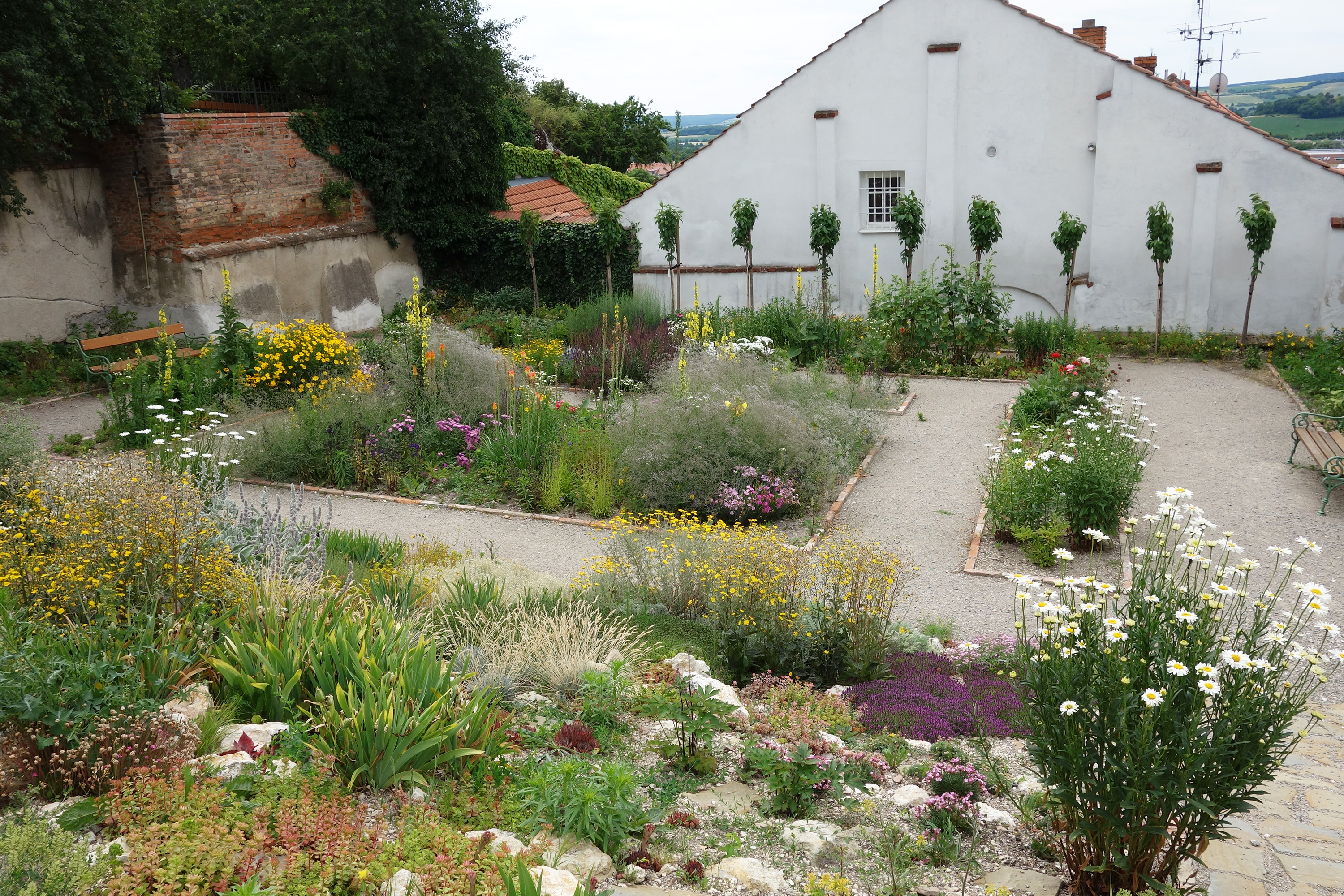 Malá botanická expozice, která je součástí zahradního komplexu mikulovského zámku.